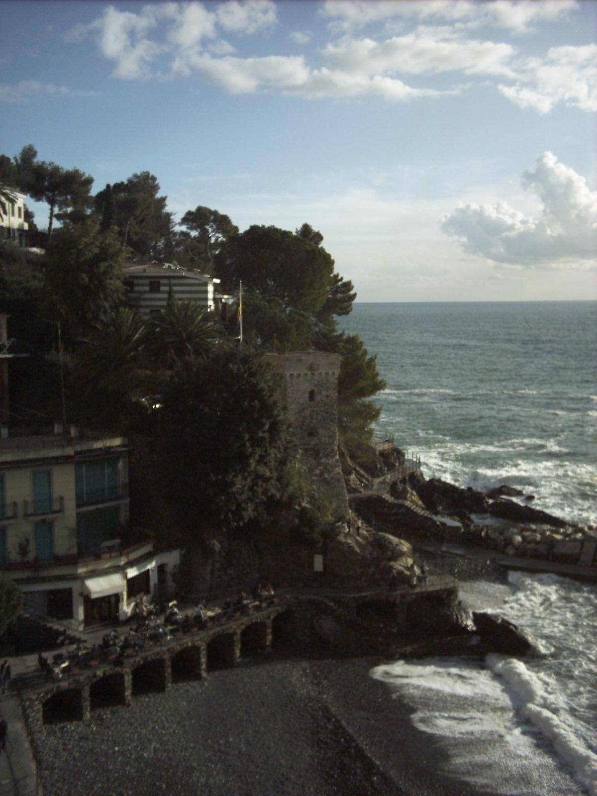 Torre Saracena di Levante